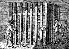 John Norcross i sit fængsel, "fugleburet", Kastellet, København. Samtidigt eller lidt senere kobberstik.